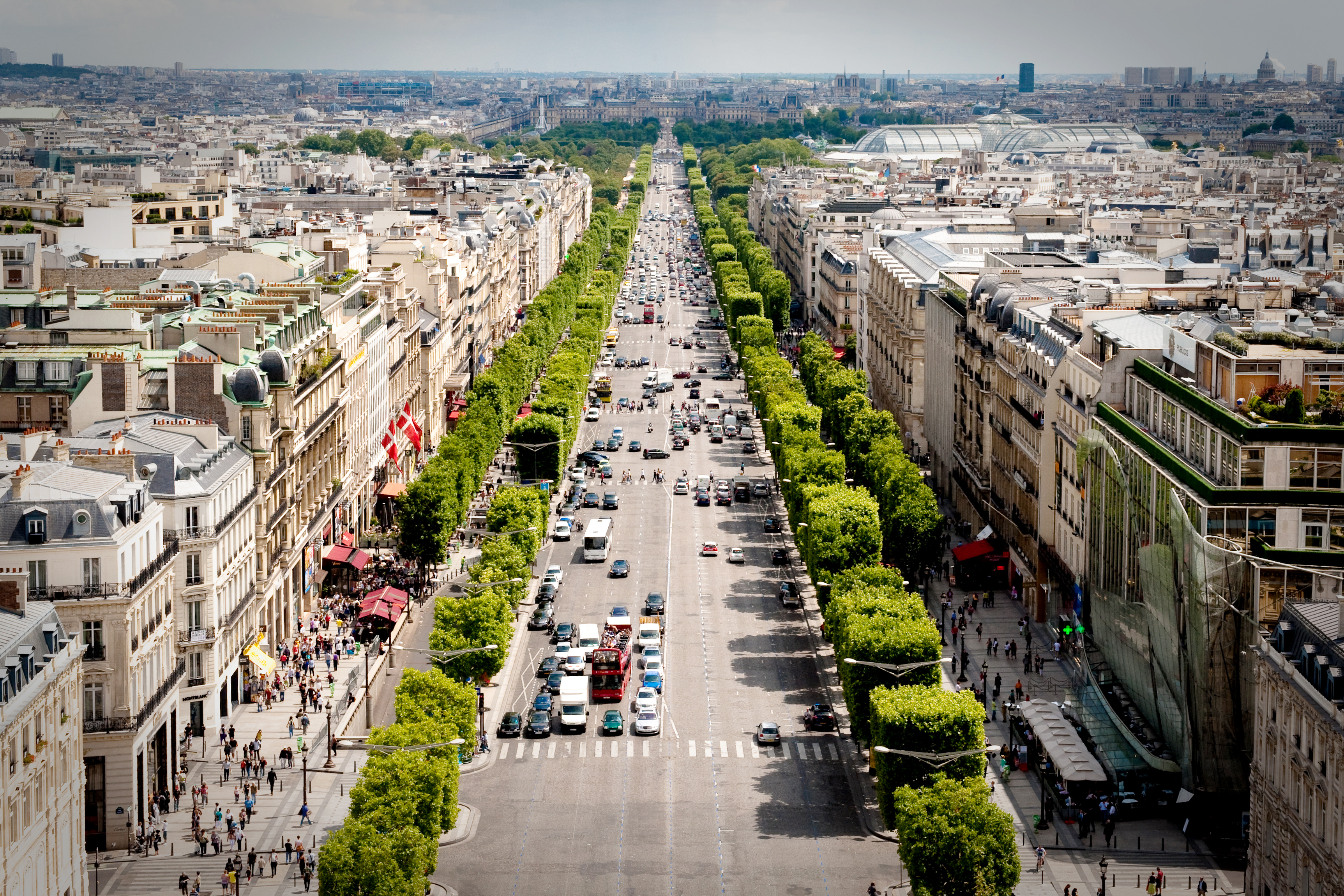 Avenue des Champs-Élysées view from the Arc de Triomphe